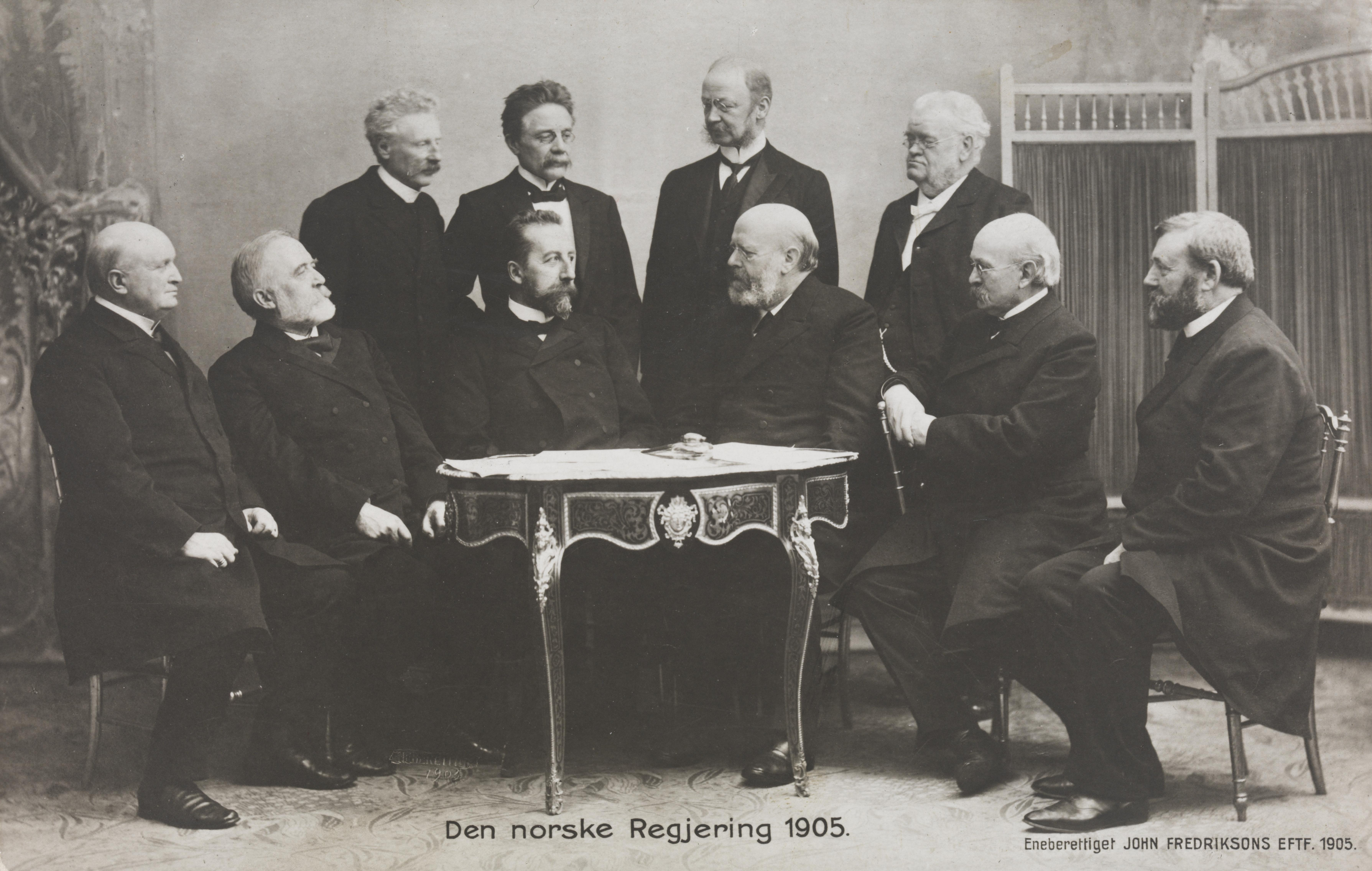 Bildet er hentet fra Nasjonalbibliotekets bildesamling Depicted person: Løvland, Jørgen Gunnarson Depicted person: Vinje, Aasmund Halvorsen Depicted person: Arctander, Sofus Anton Birger Depicted person: Bothner, Harald Depicted person: Bull, Edvard Hagerup Depicted person: Lehmkuhl, Kristofer Depicted person: Knudsen, Christoffer Depicted person: Knudsen, Gunnar Depicted person: Michelsen, Christian Depicted person: Olssøn, Wilhelm